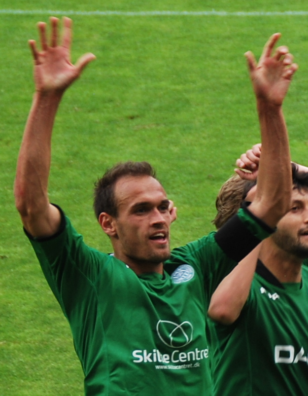 Fodboldspilleren Mikkel Rask fra Viborg FF. Her efter 1. divisionskampen mod FC Roskilde på Viborg Stadion.